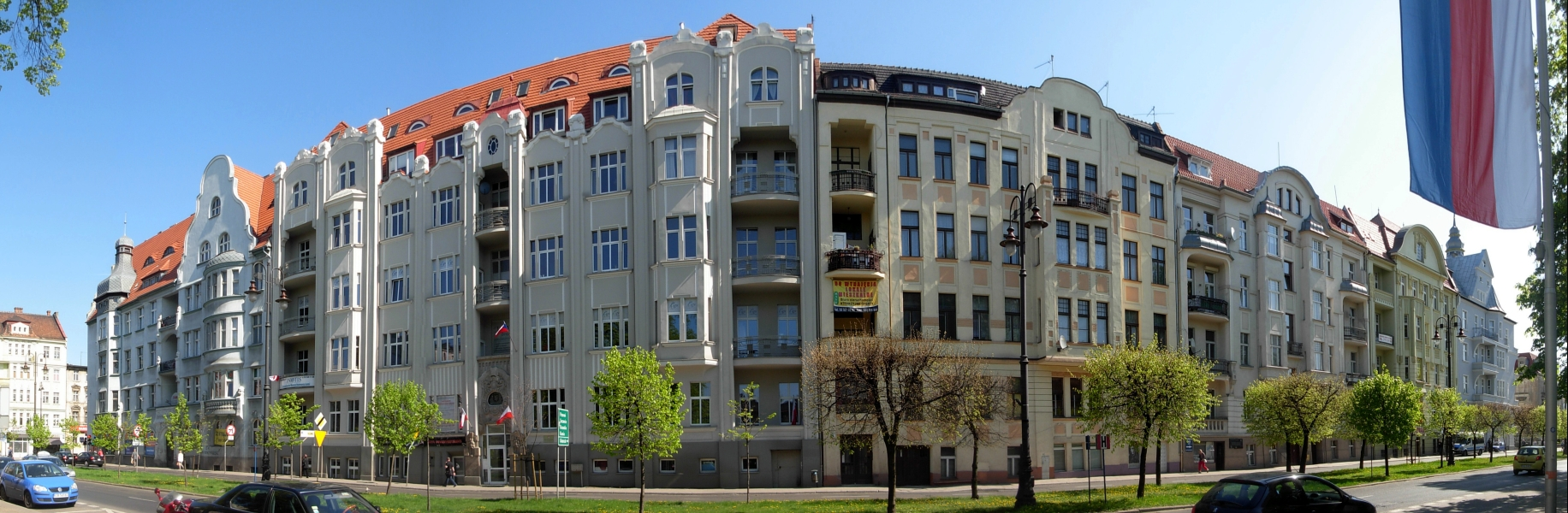 Północna pierzeja alei Adama Mickiewicza w Bydgoszczy